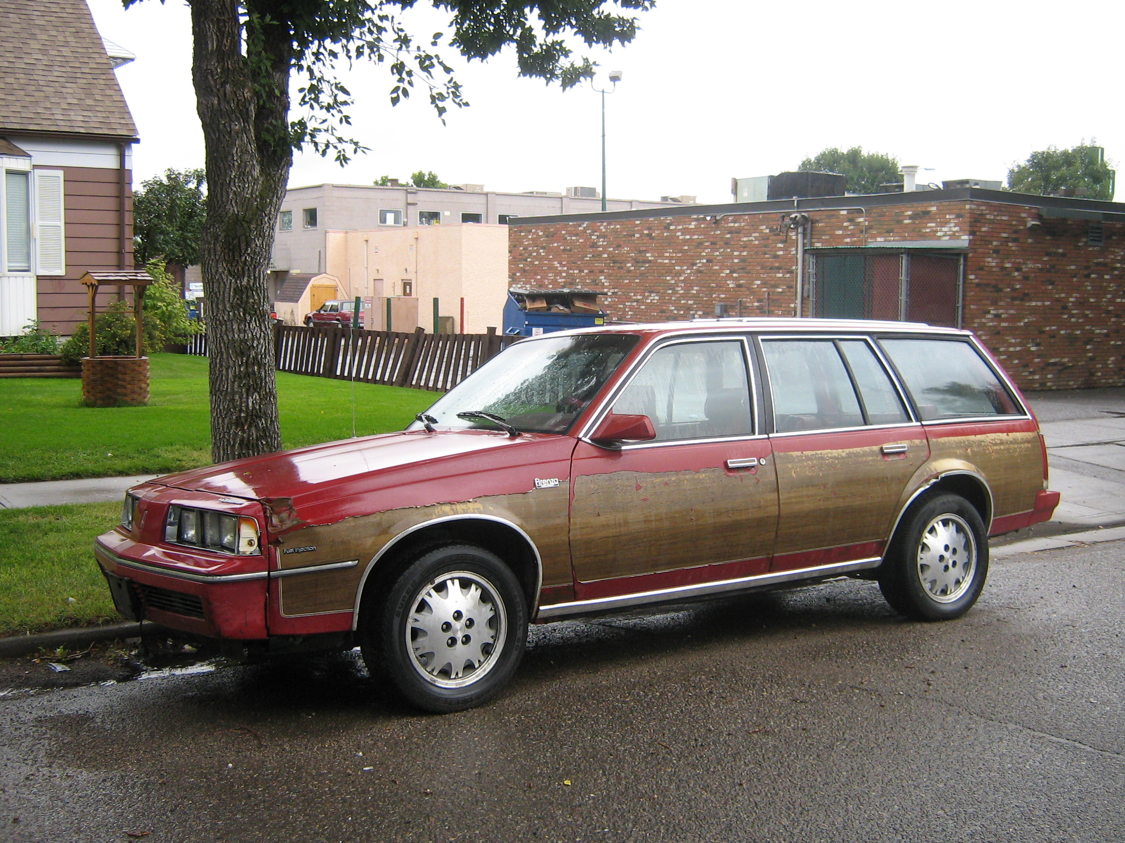 1986-1987 Oldsmobile Firenza Cruiser - non stock rims